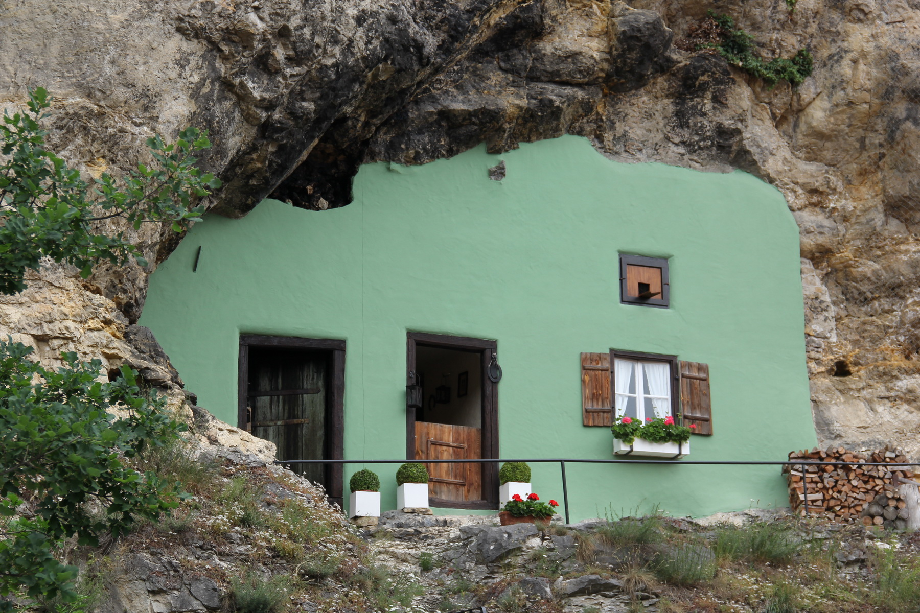 Kallmünz, Upper Palatinate, Bavaria, Germany